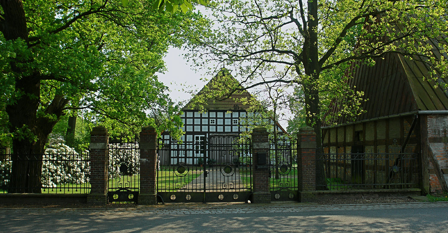 Bauernhaus Osterholzer Dorfstraße 29, Bremen-Osterholz.Erbaut um 1816 Das abgebildete Objekt ist ein geschütztes Kulturdenkmal in der Freien Hansestadt Bremen, mit der Nr. 0968 beim Landesamt für Denkmalpflege registriert.